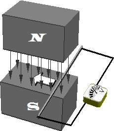 Princip indukcije